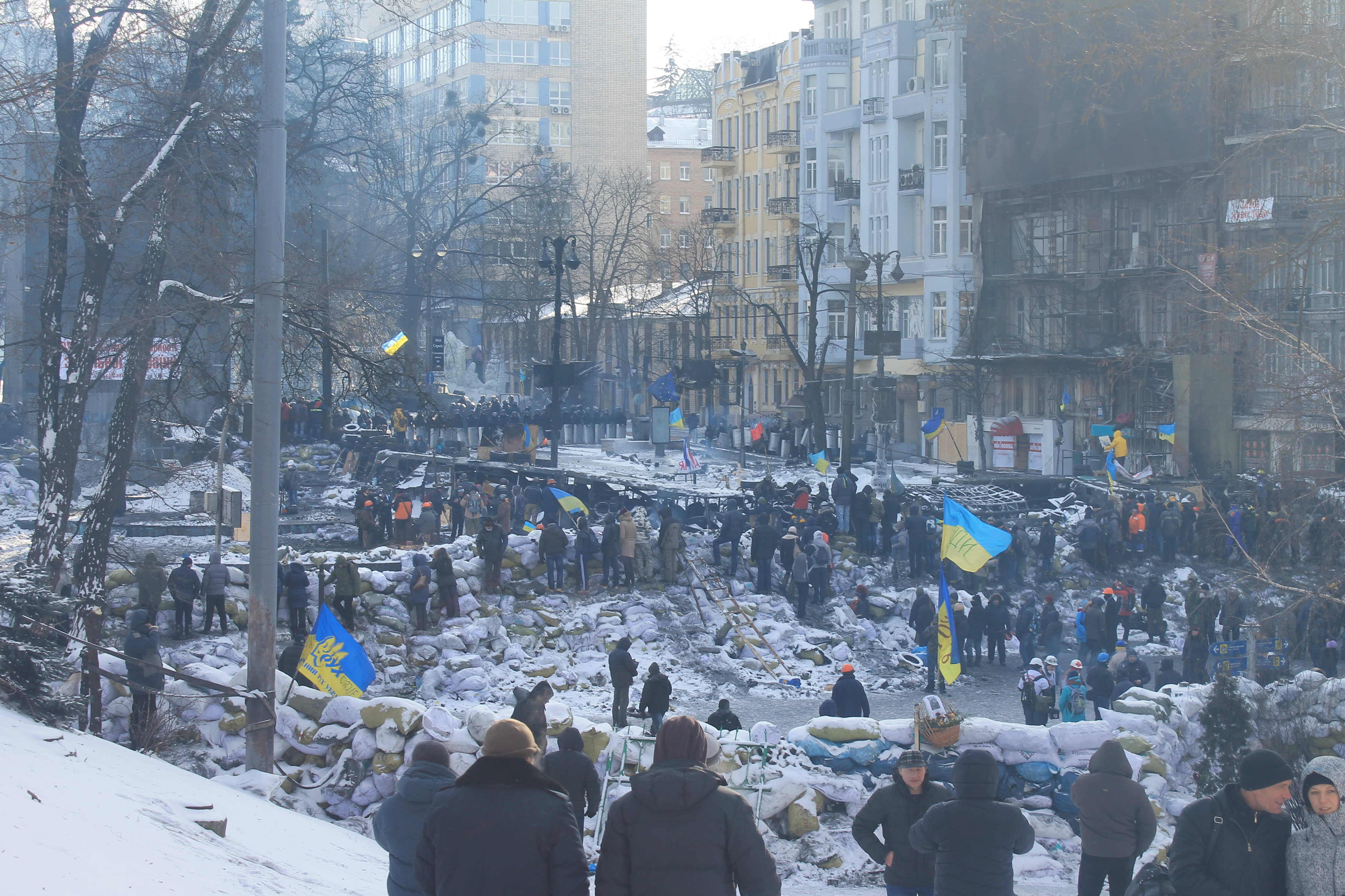 Київ 29 січня 2014. Панорама на вул. Грушевського